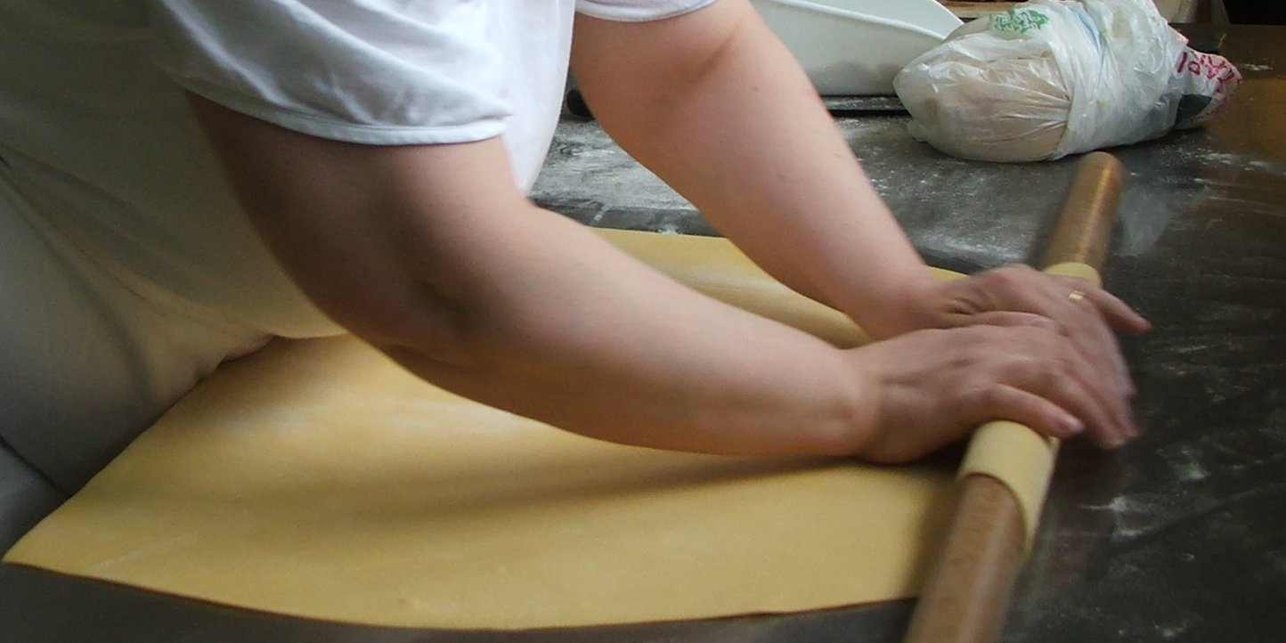 hand making pasta